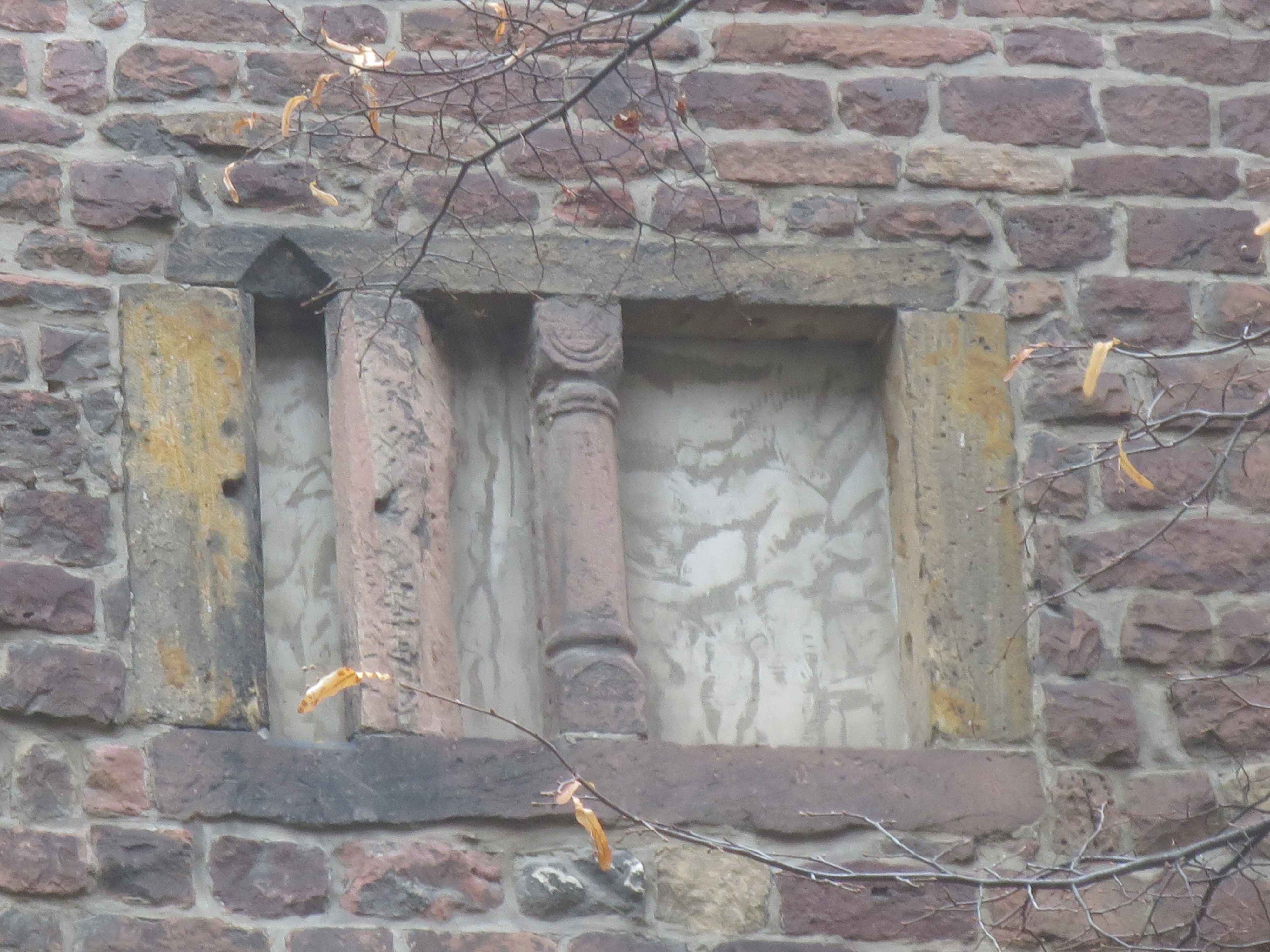 Stadtmauer Worms, zugesetztes Fenster, Säulchen mit Würfelkapitel